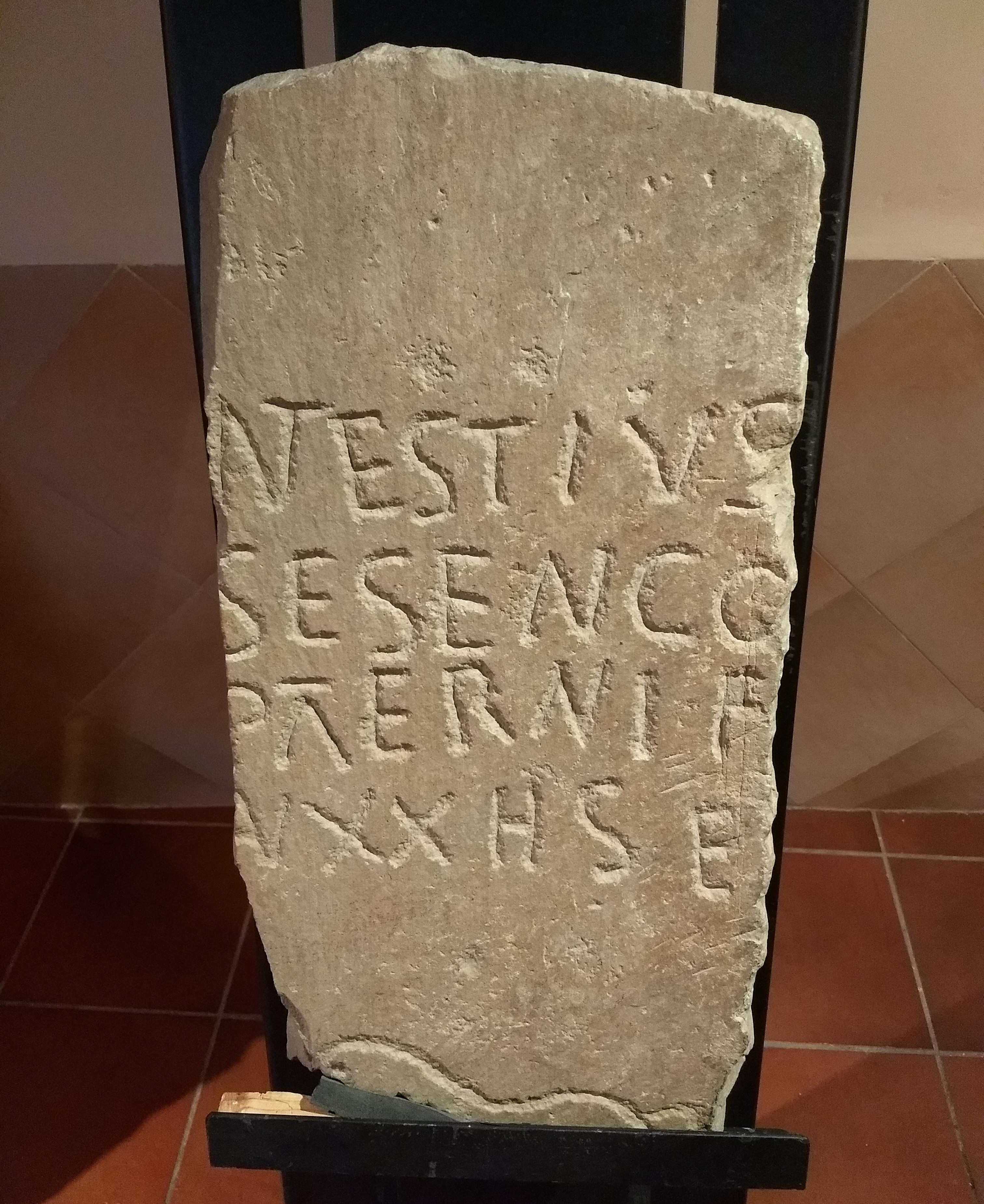 La estela funeraria romana de “Antestius Sesenco” fue hallada en La Laguna, Soria. Aquí se muestra en la exposición de Santa Cruz de Yanguas, Soria.